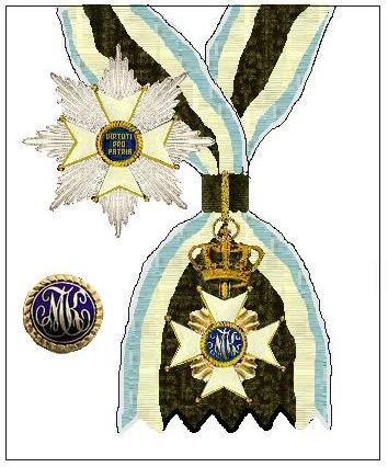 Eigen tekening. Veel werk